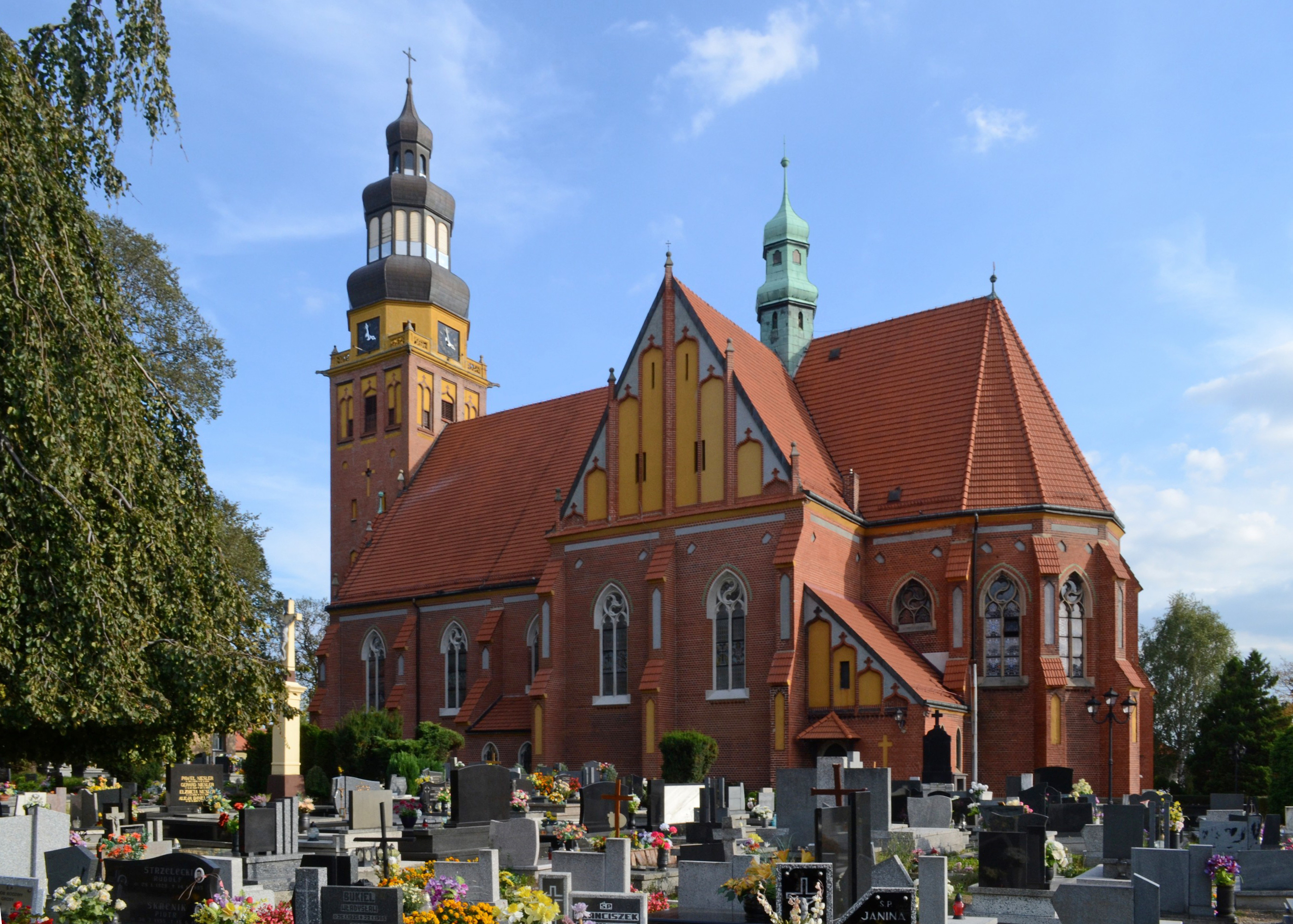 Wodzisław Śląski, ul. Kościelna 1 - Kościół parafialny p. w. Wniebowzięcia Najświętszej Marii Panny (zabytek nr A/1540/94)